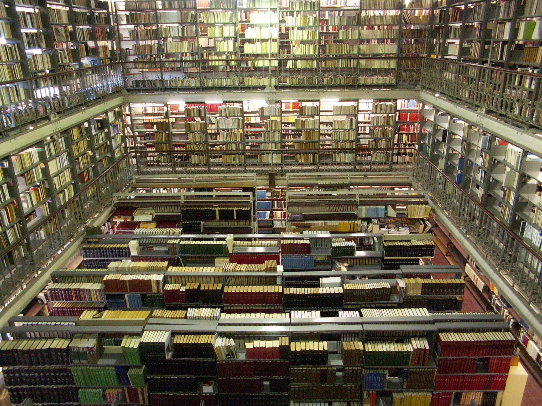 Bibliothèque du Grand Séminaire de Montréal, Québec, Canada